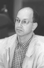 Joel Benjamin